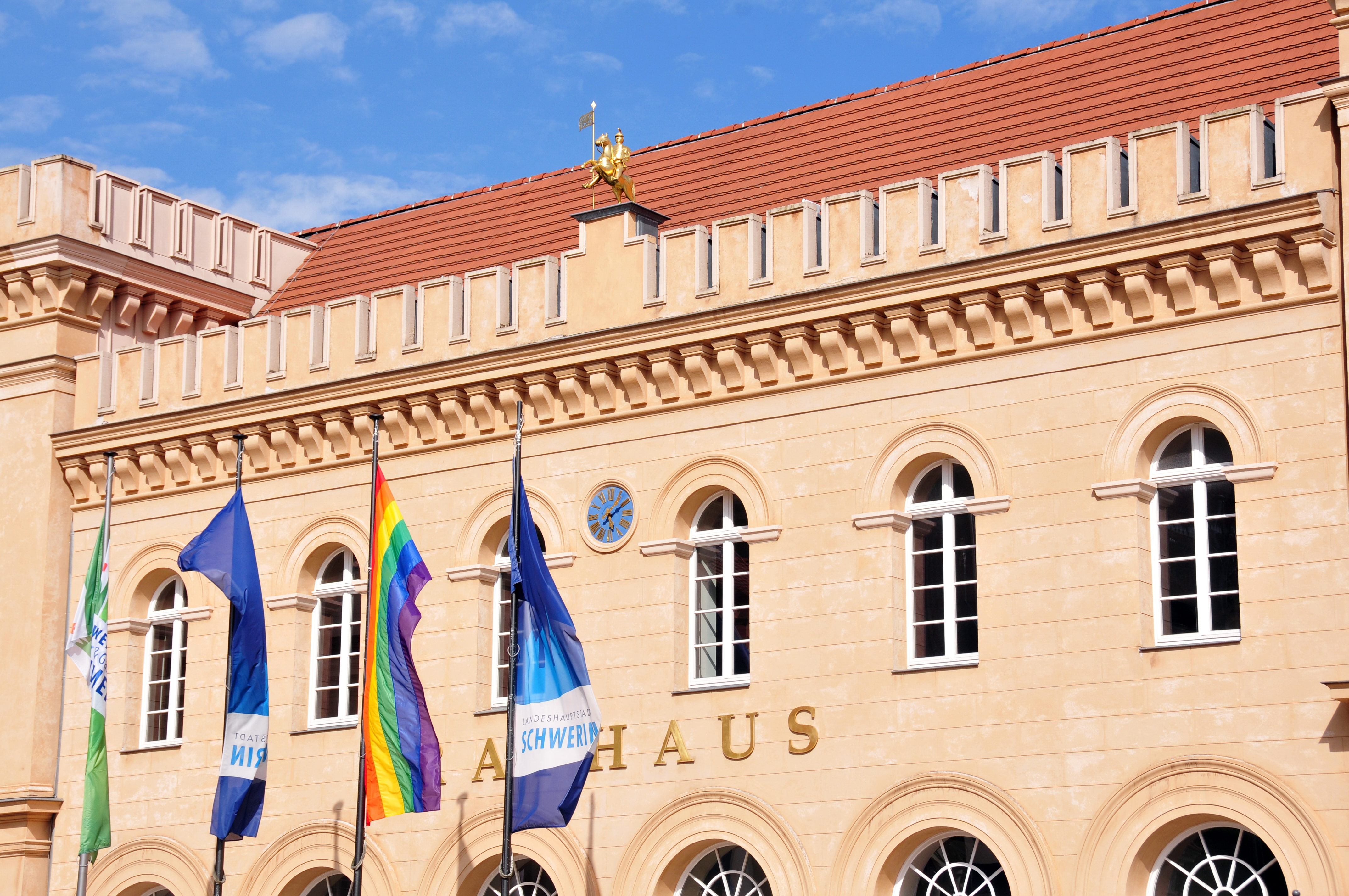 Schwerin; mit 50mm Brennweite von der Orangerie zum Bahnhof Rathaus - auch hier muß man nicht unbedingt das ganze Haus sehen, um es typisch darzustellen